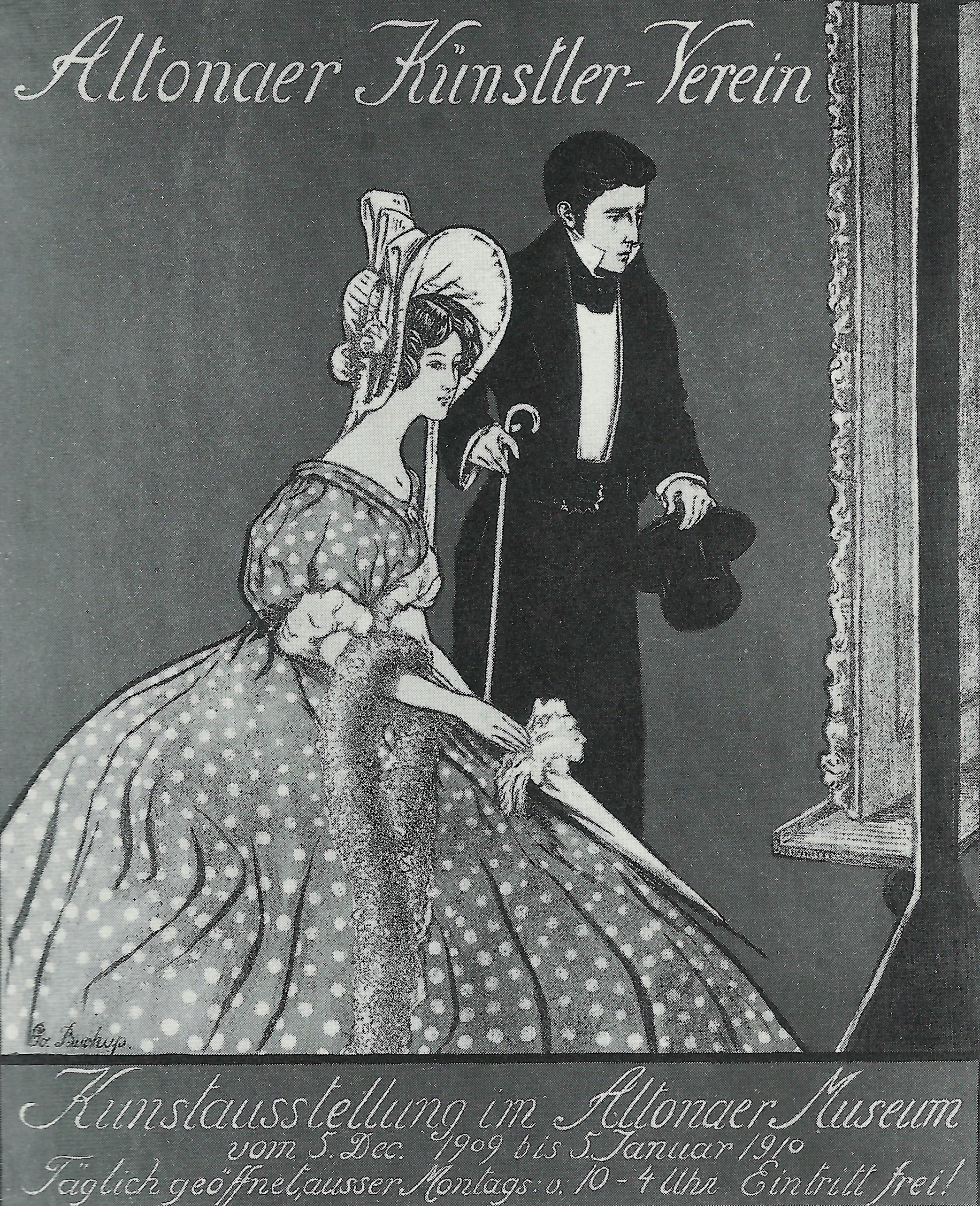 Schwarz-weiß-Abbildung eines Ausstellungsplakts des Altonaer Künstlervereins, 1909/1910. Das Paar, ein Bild betrachtend, trägt Bekleidung, wie sie bis 1870 modern war. Entwurf von George Buckup, Lithografie, 62 × 51 cm. Altonaer Museum, Inv. Nr.: AB 8210